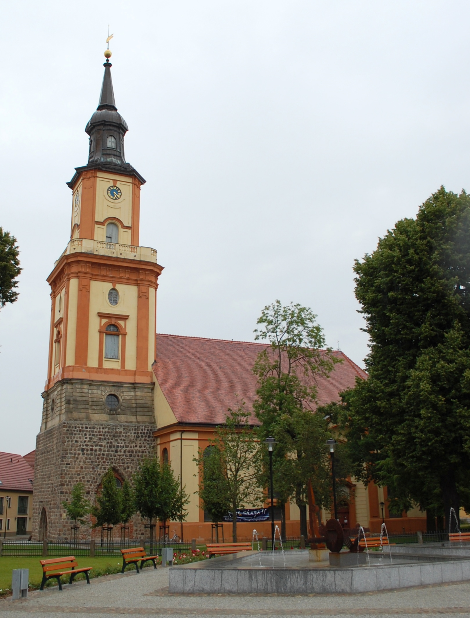 Sankt-Maria-Magdalena-Kirche in Templin